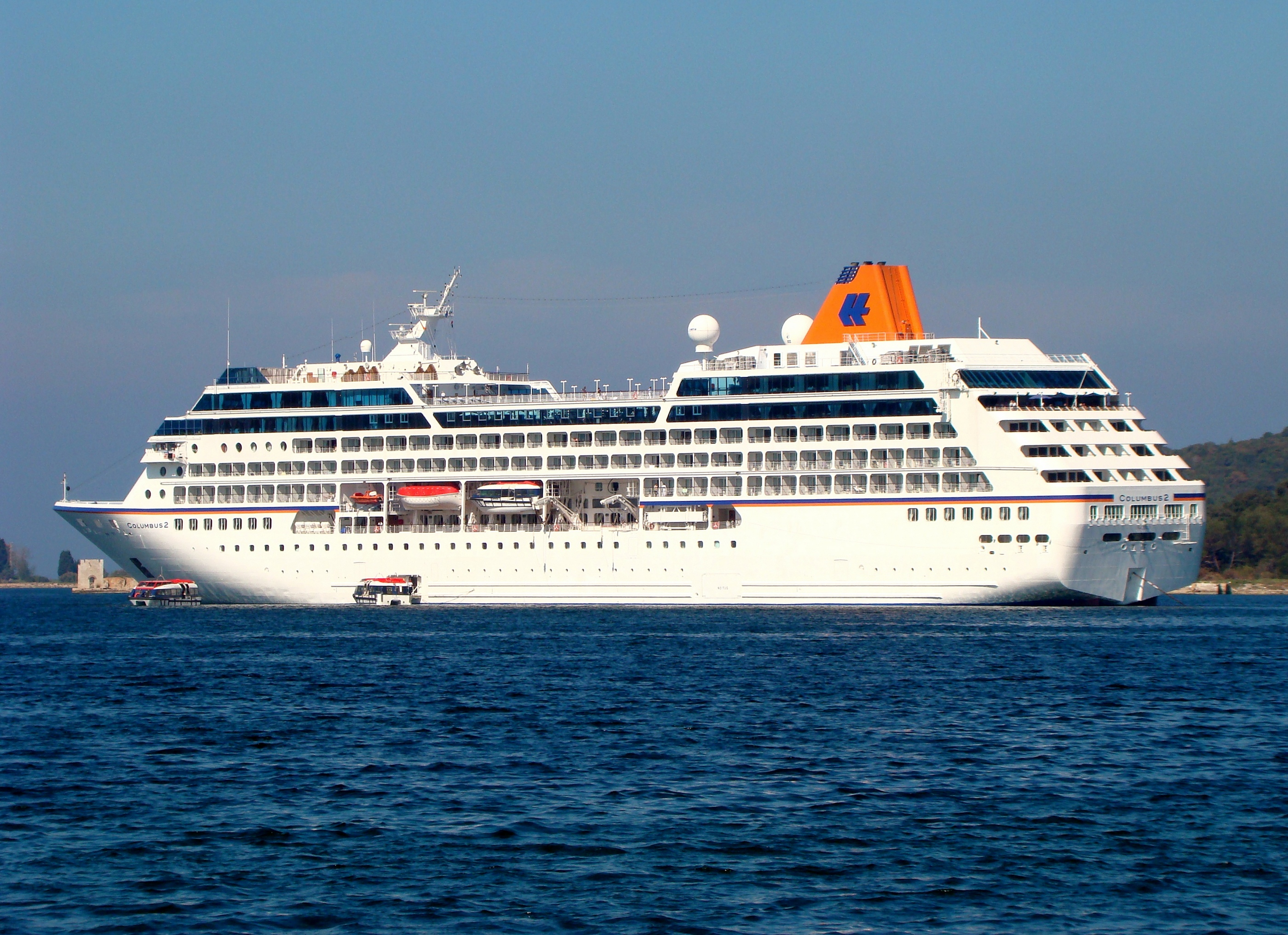 Columbus 2 u Puli